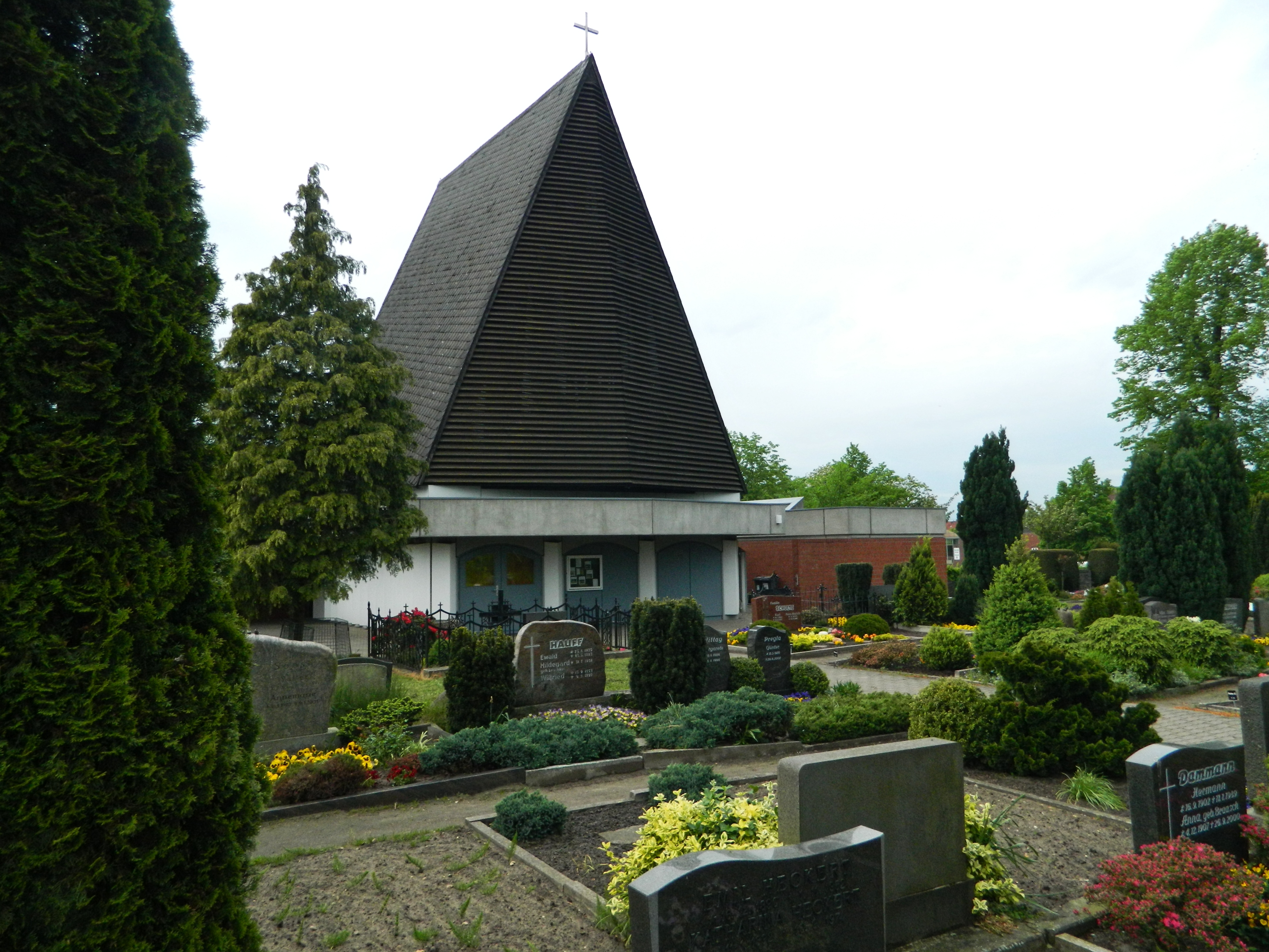 Friedhofskapelle